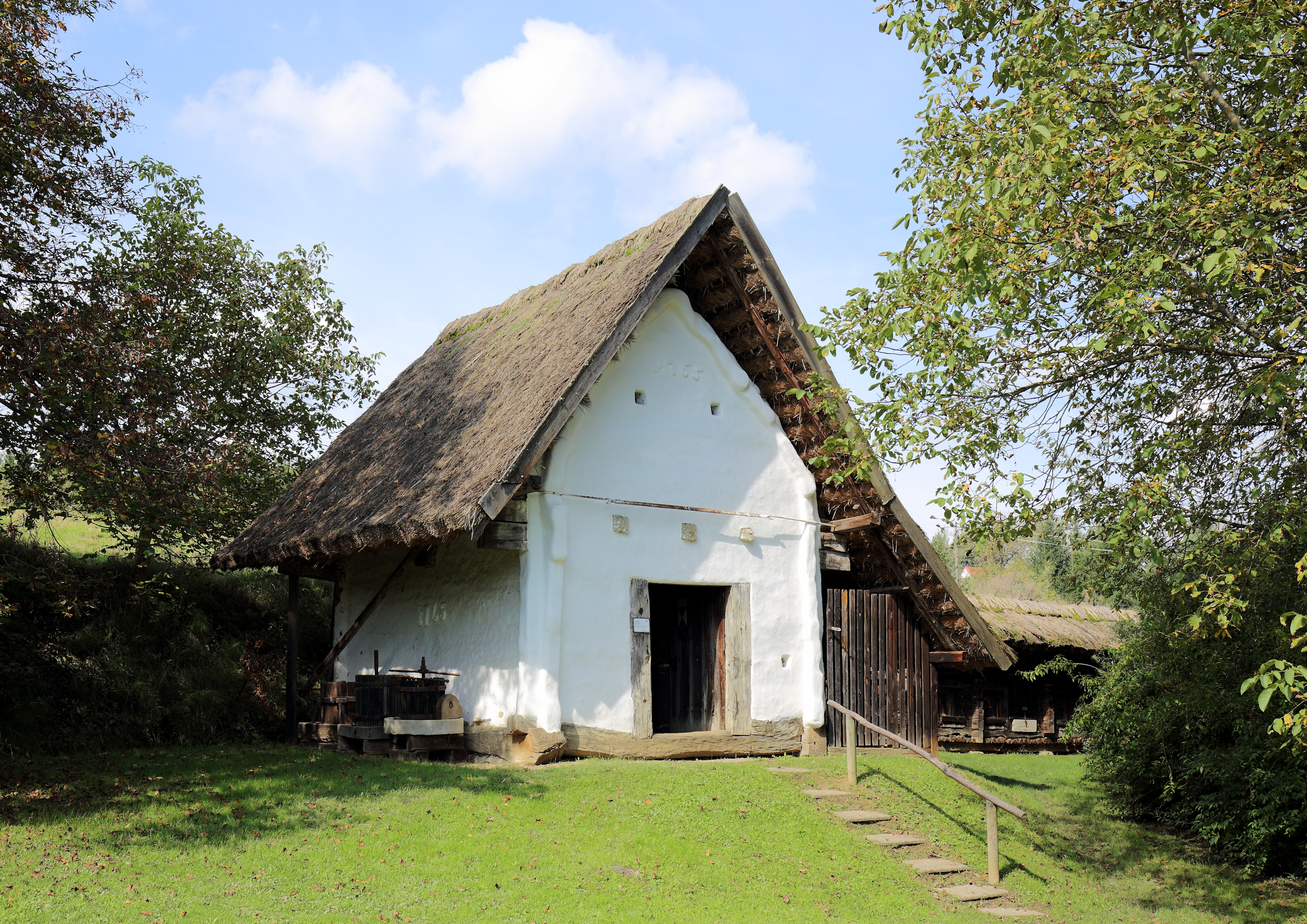 Speicher (Kitting) aus Unterschützen im Freilichtmuseum Gerersdorf (Objektnummer 11) in der burgenländischen Gemeinde Gerersdorf-Sulz. Ein zweigeschossiger Speicherbau, der mit 1765 datiert ist.